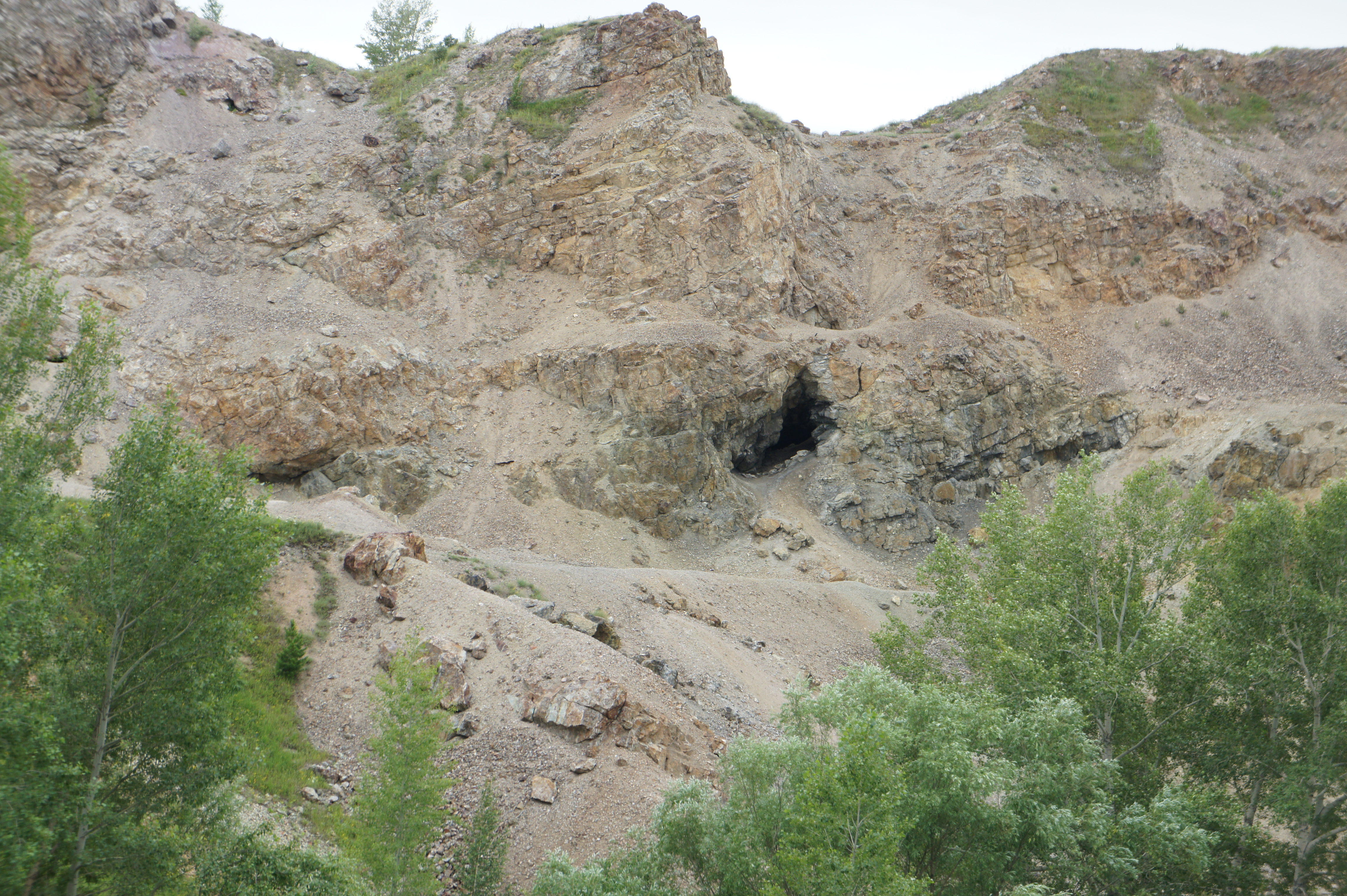 Карьер на месте месторождения Змеиная гора, давшей название городу Змеиногорску